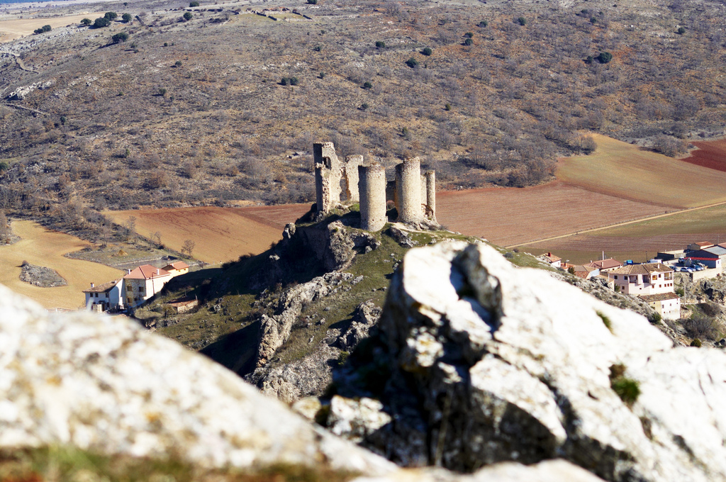 Castillo de Pelegrina (Monumento, 1949)